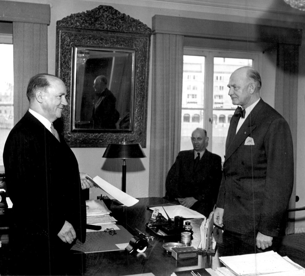 Statsrådet Weijne i samtal med delegationens talesman, landshövding Löfgren. En delegation från Jämtlands län med landshövding Torsten Löfgren i spetsen uppvaktade på tisdagsförmiddagen ecklesiastikministern, statsrådet Weijne, för att stödja den framställning som gjorts av styrelsen för Jämtlands läns bibliotek, länets landsting och och stadsfullmäktige i Öresund ett det vid årsskiftet ledigblivna granskningsexemplet av svenskt tryck måste mötte överlämnas till Jämtlands läns bibliotek.